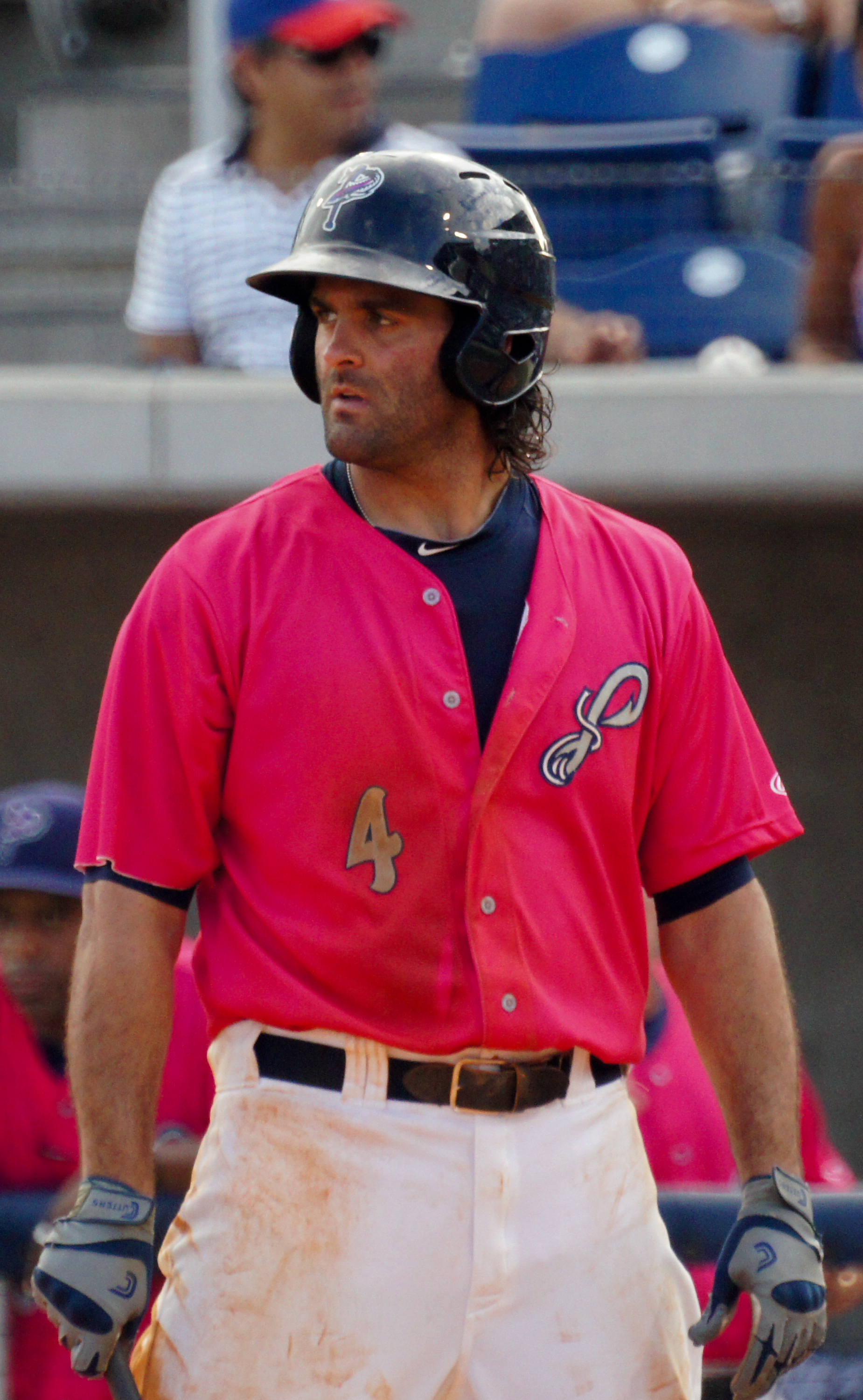 Mike Costanzo